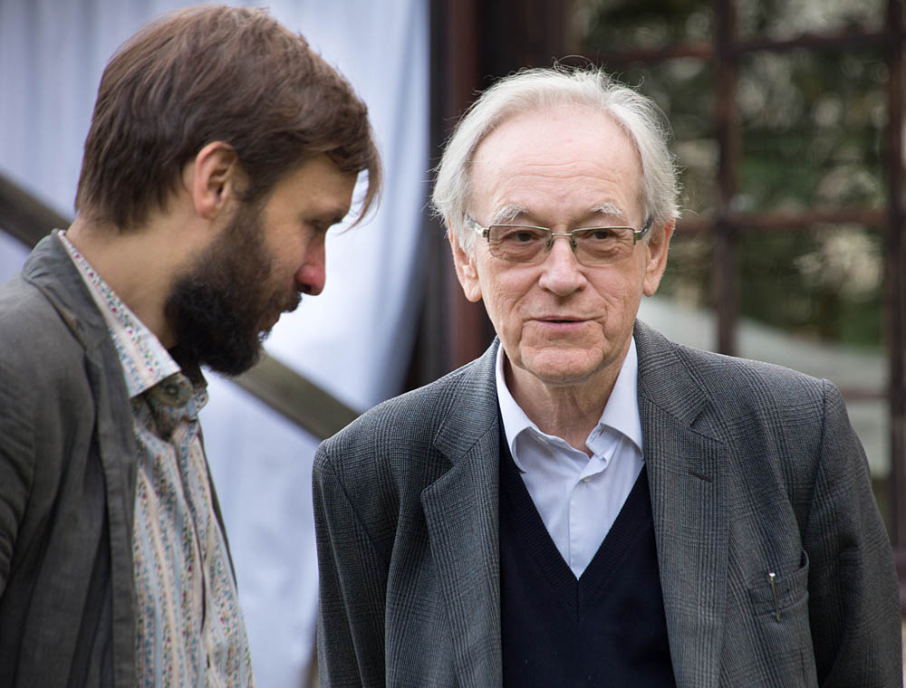 Druga edycja Akademii Platońskiej, która odbyła się 16–21 września 2018 roku w Lanckoronie. Na zdjęciu Karol Tarnowski i Andrzej Serafin.